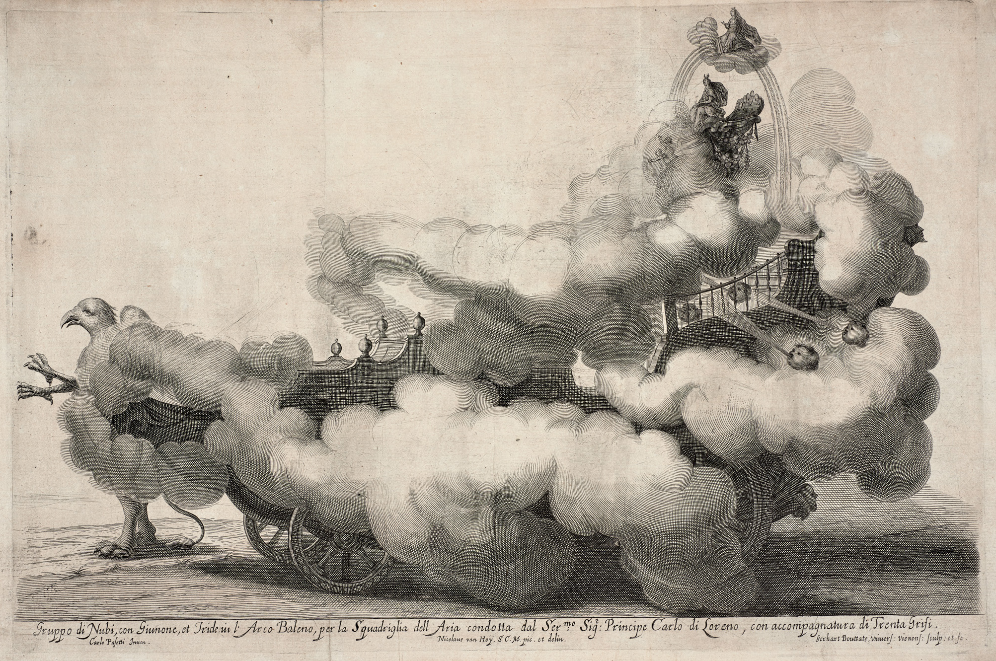 Carro de Juno e Isis del ballet ecuestre "La Contessa dell'Aria e dell'Aqua", espectáculo celebrado con motivo del matrimonio del emperador Leopoldo I con la infanta Margarita de Austria, Viena, 1667